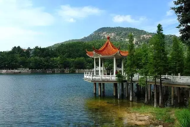 粵語: 芙蓉嶂一亭